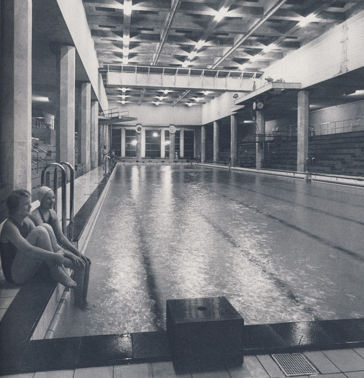 Simhallen i Sportpalatset i Stockholm 1956 (kort innan rivningen)